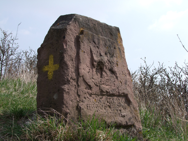 Steinkreuz auf dem Petersberg in Rheinhessen zwischen Bechtosheim und Gau-Odernheim